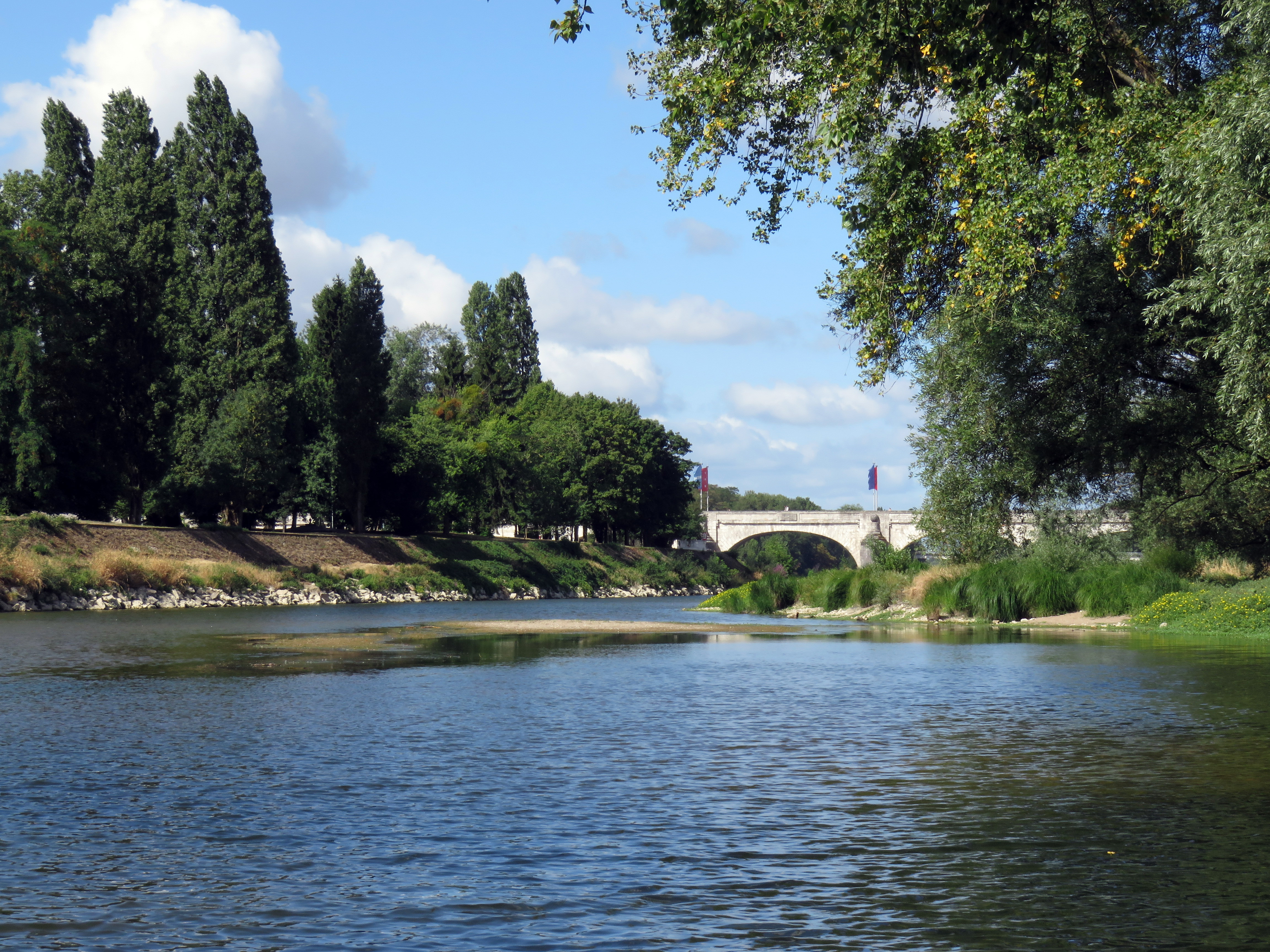 L'ile Aucard avec en fond le pont Wilson ou pont de pierre.